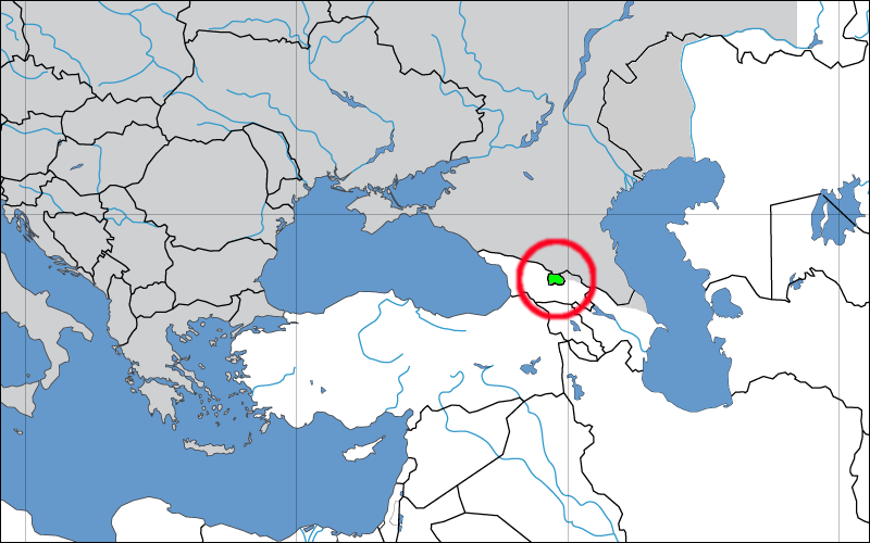 Ver Image:Location of South Ossetia in Europe.png